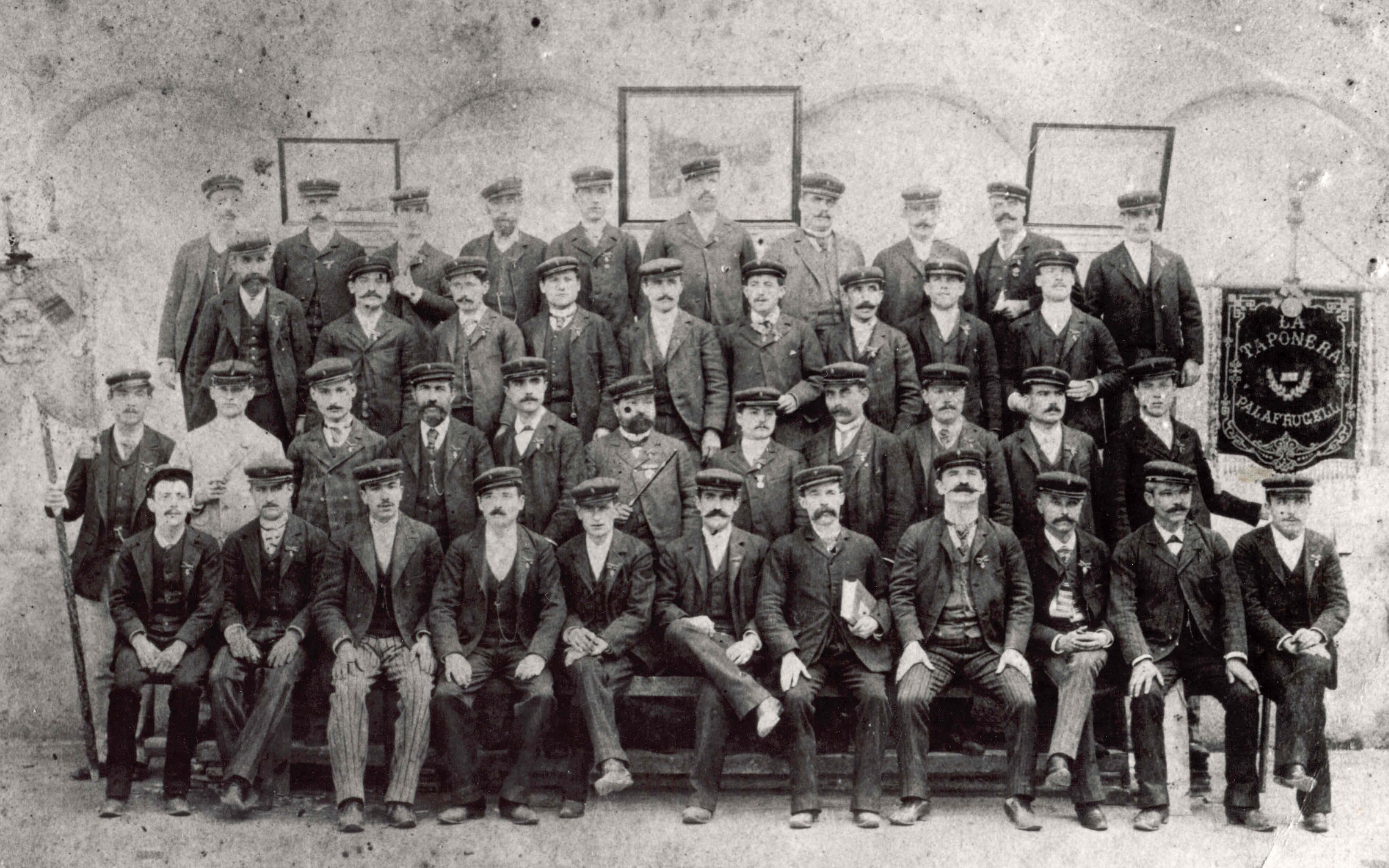 Fotografia de la coral La Taponera (ca. 1883 - 1900). Arxiu d'imatges Museu del Suro